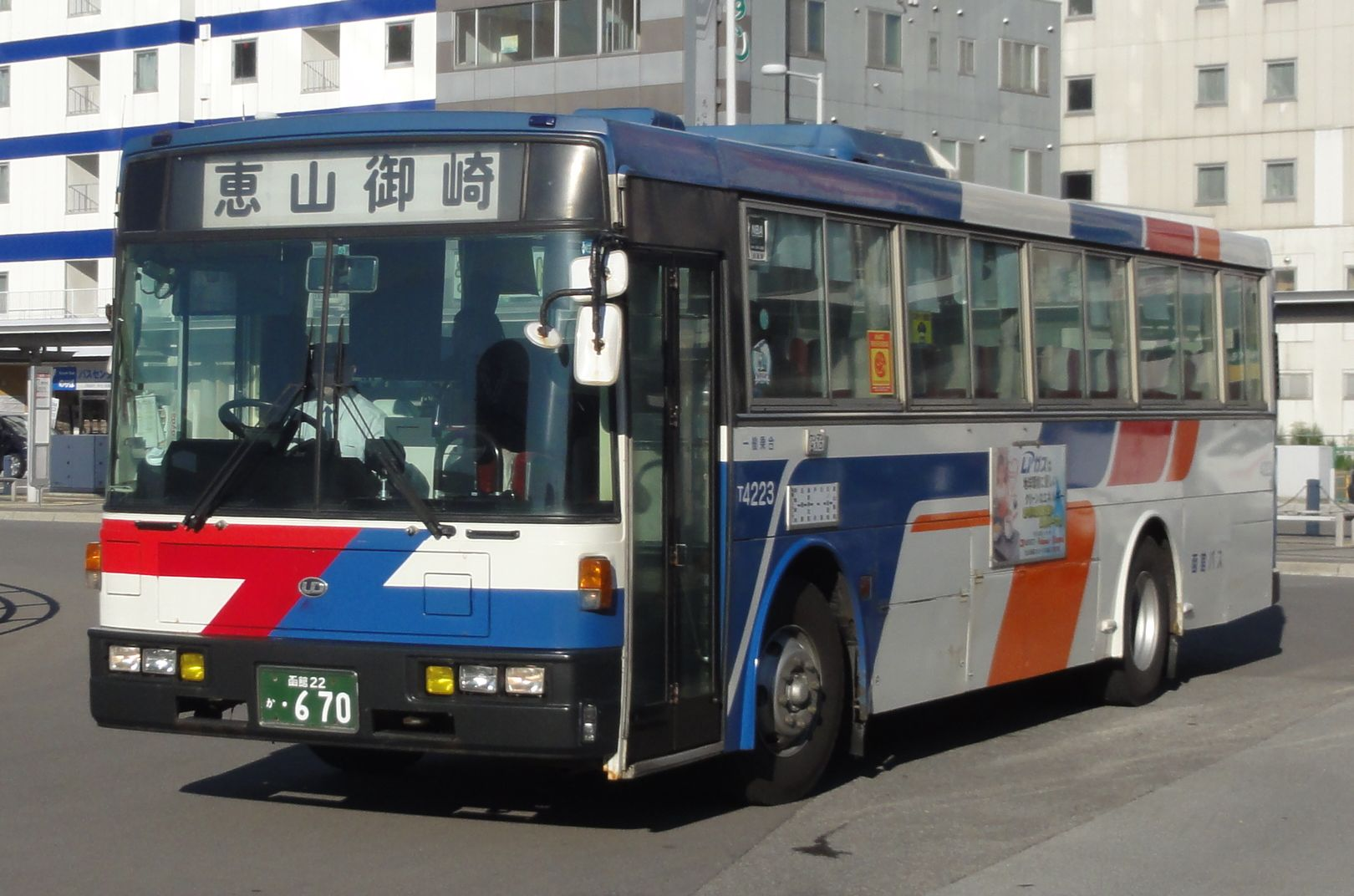 Hakodate Bus car 函館バス 路線バス